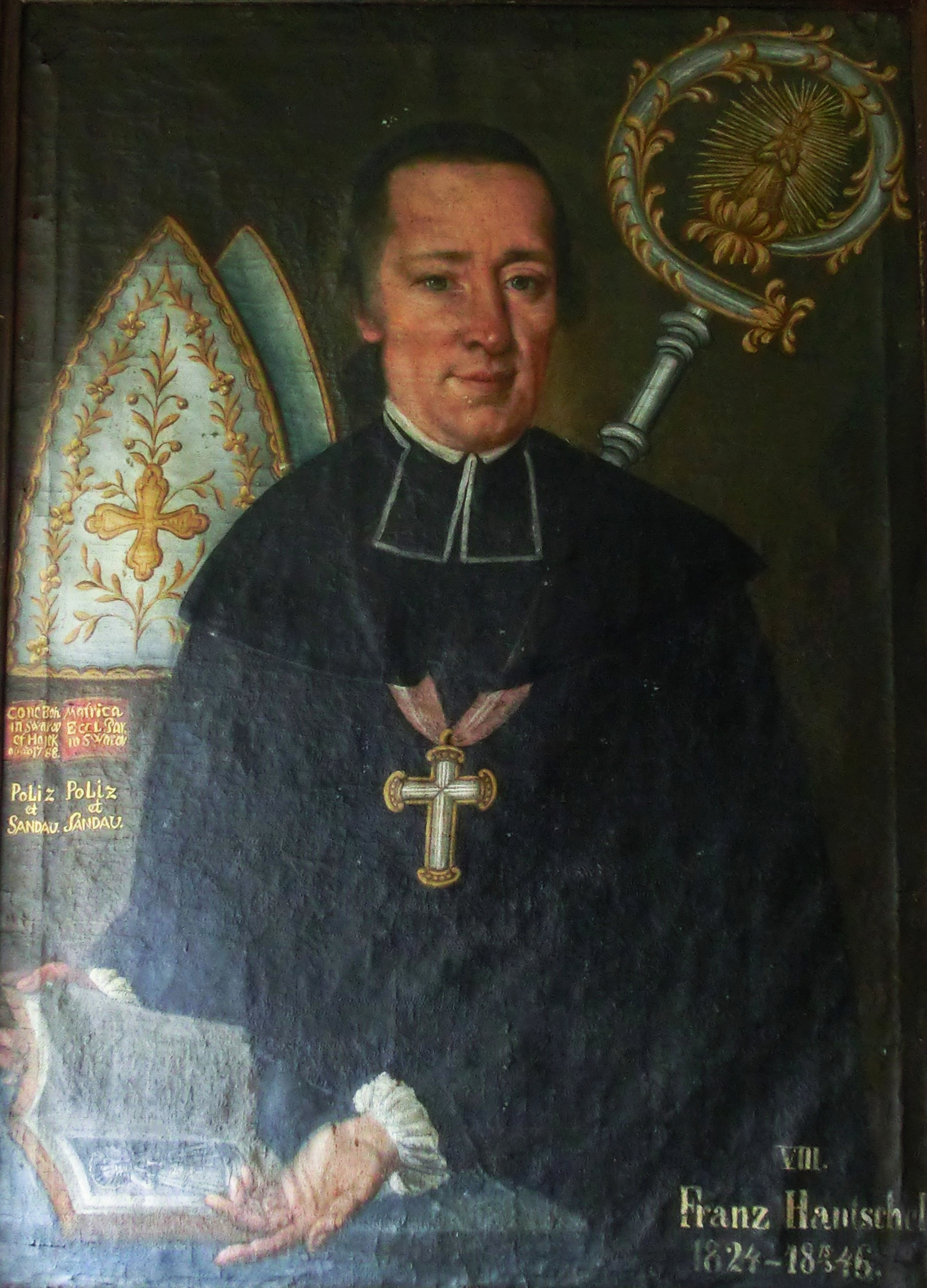 1846 František Hantschel, 8. infulovaný arciděkan v Horní Polici.